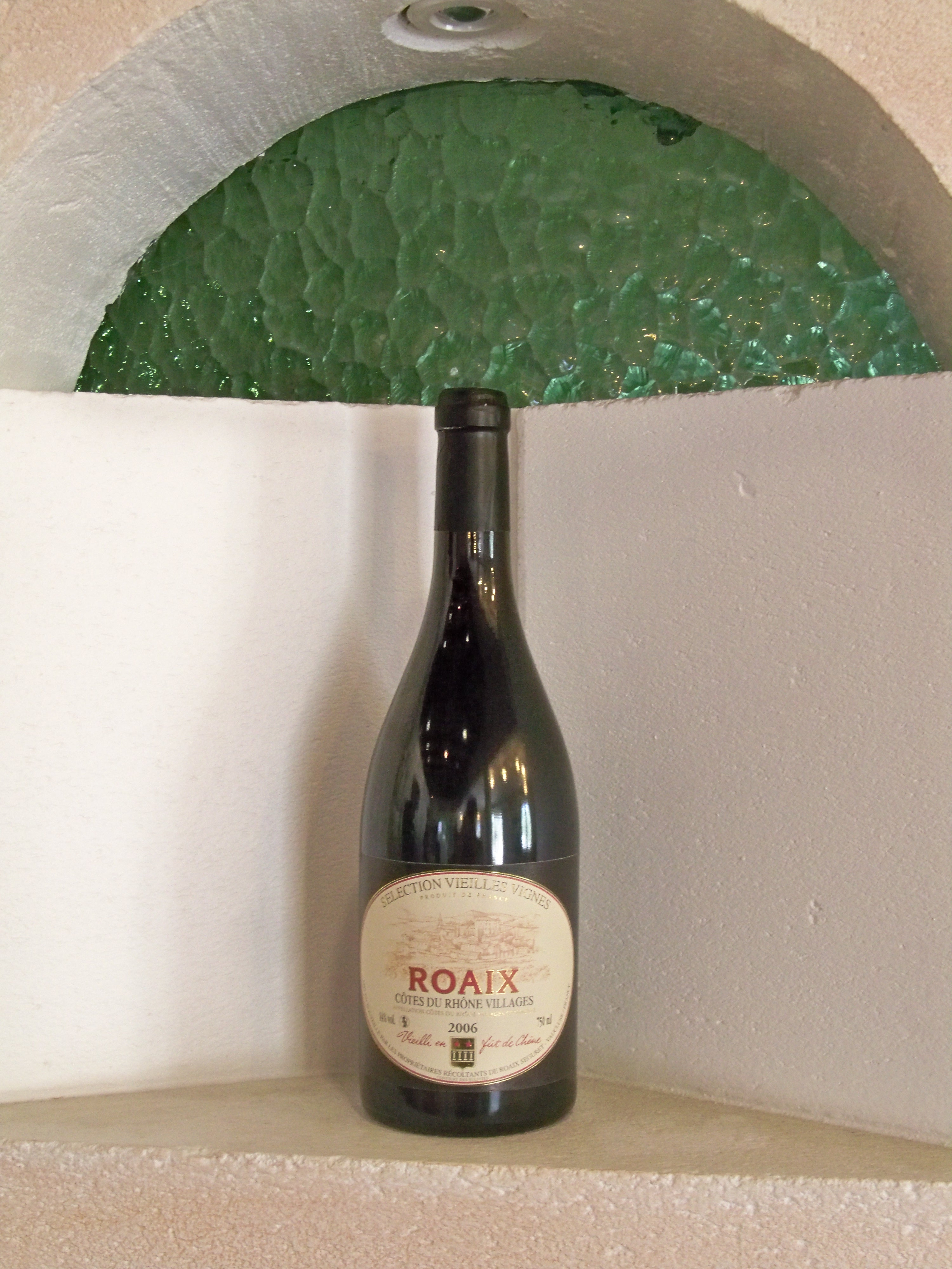 Bouteille de vin de ROAIX AOC, Vaucluse